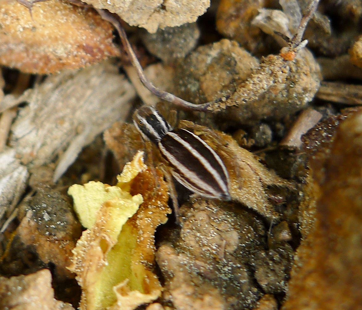 Alcornocales N.P. Andalucia, Spain.